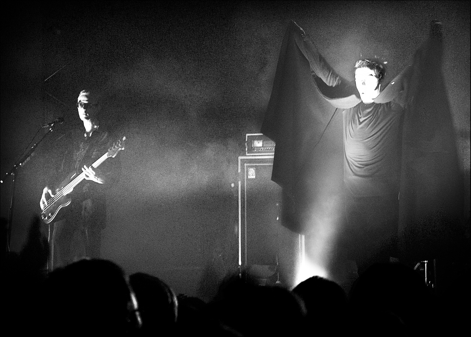 Emiliàn e rumagnòl: Peter Murphy di Bauhaus vistî da Dracula